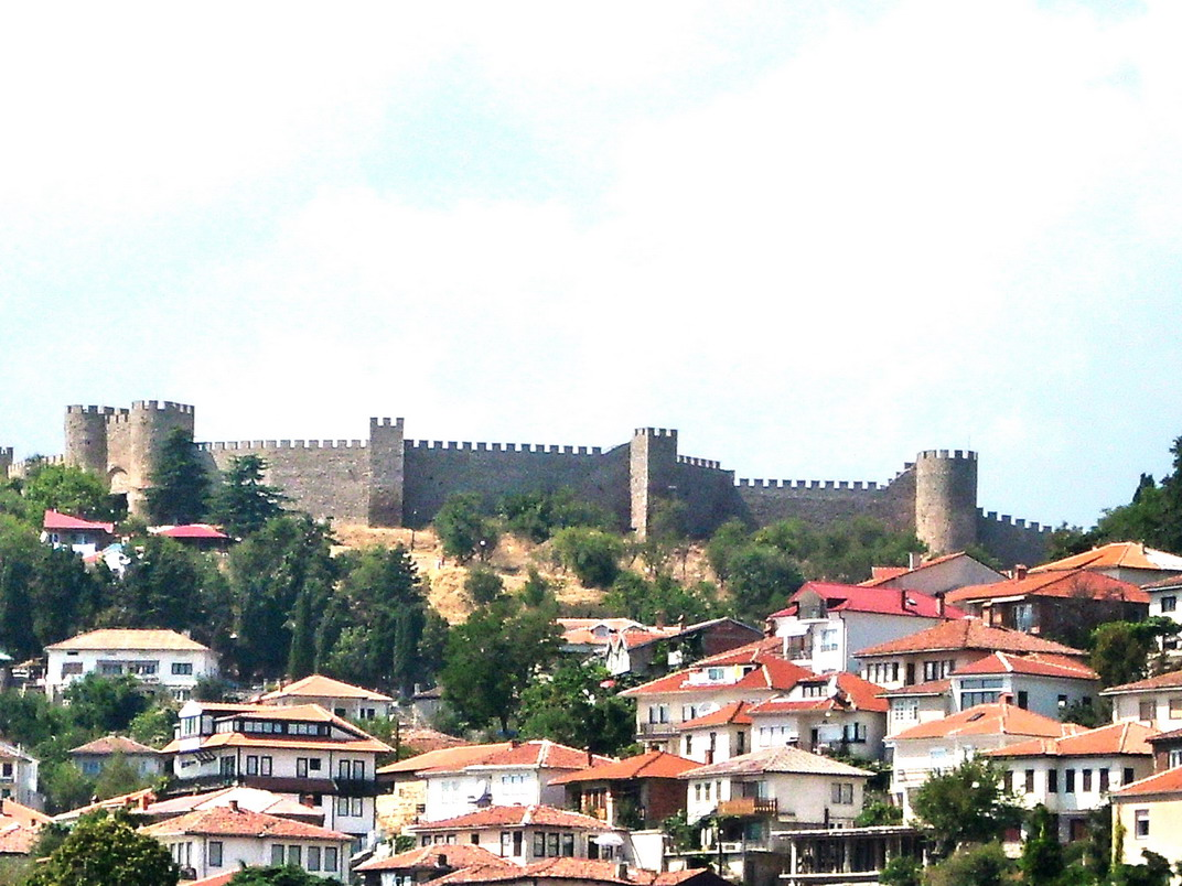 Град Охрид (Република Македония) - част от цитаделата на цар Самуиловата крепост